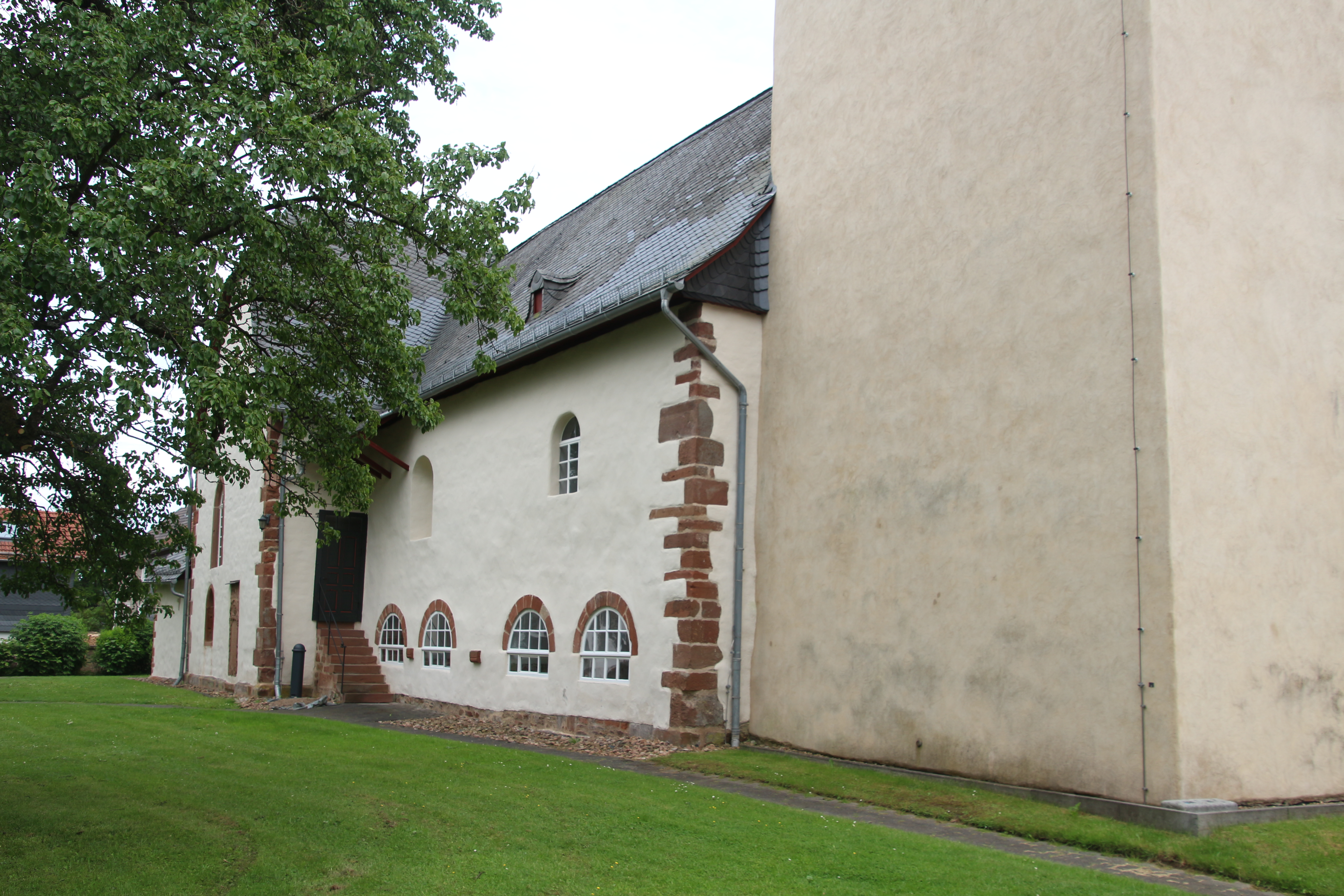 Siehe Bild und Dateiname